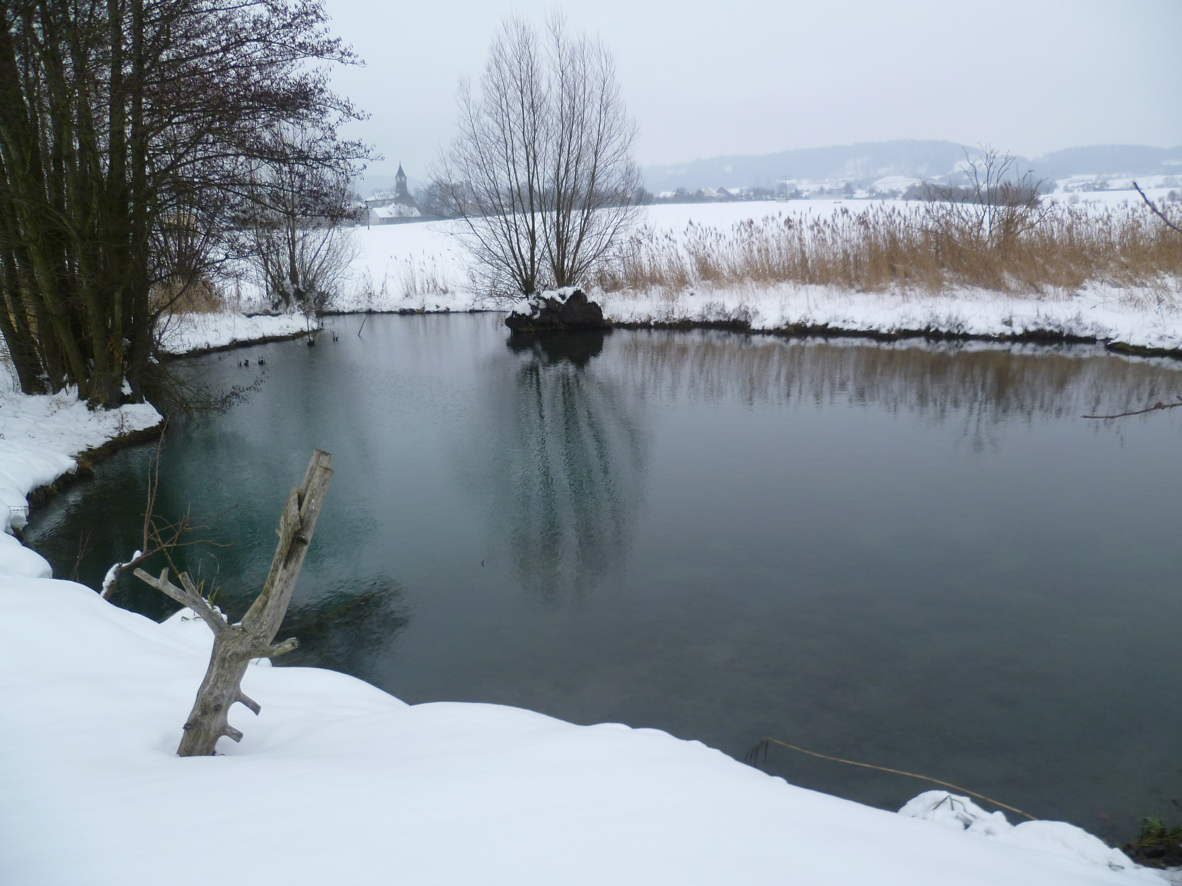 Das Bodenlose Loch bei Diebach